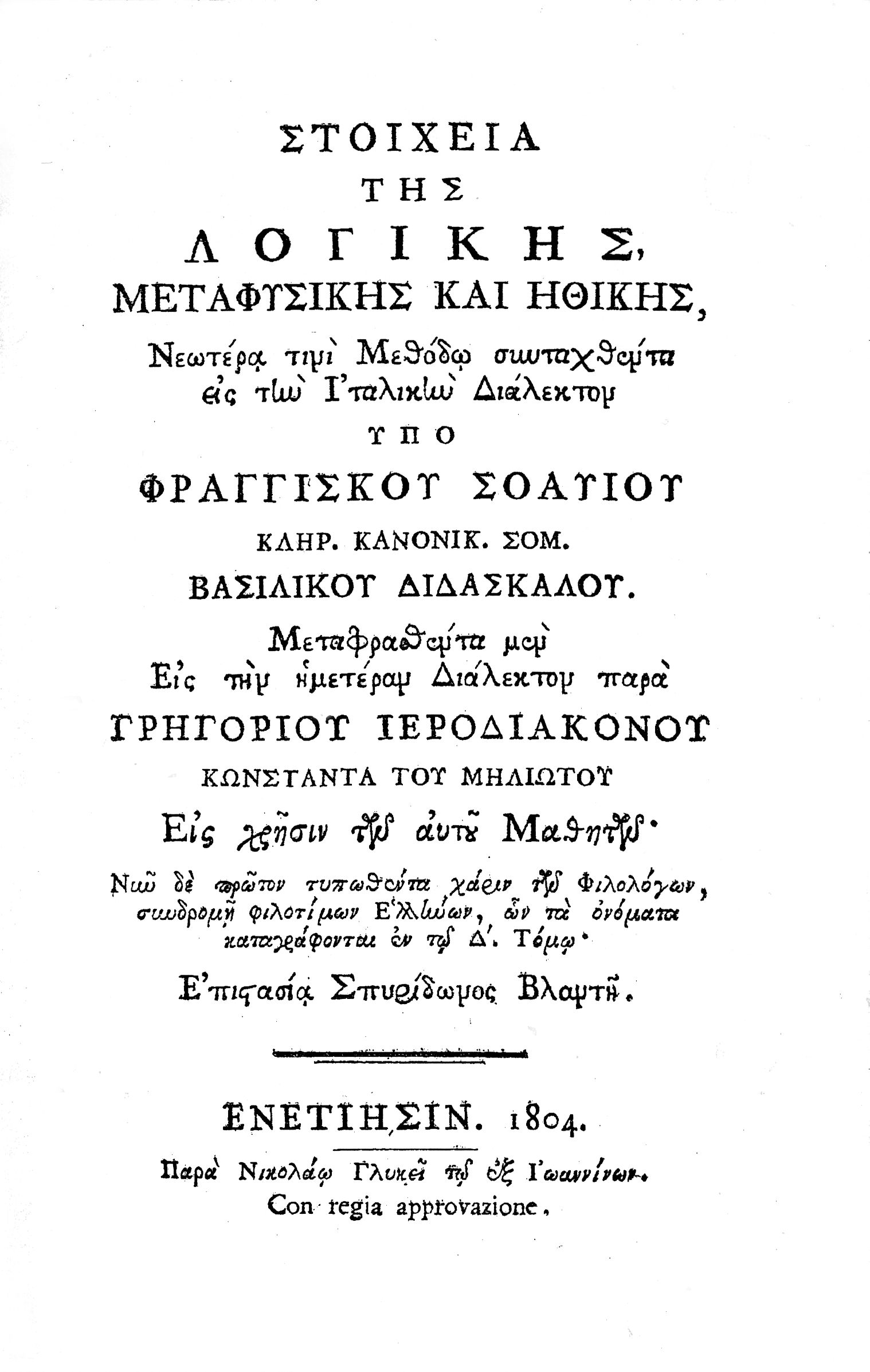 Το βιβλίο του Francesco Soave, μεταφρασμένο από τον Γρηγόριο Κωνσταντά, τυπώθηκε σε 4 τόμους το 1804 στη Βενετία.